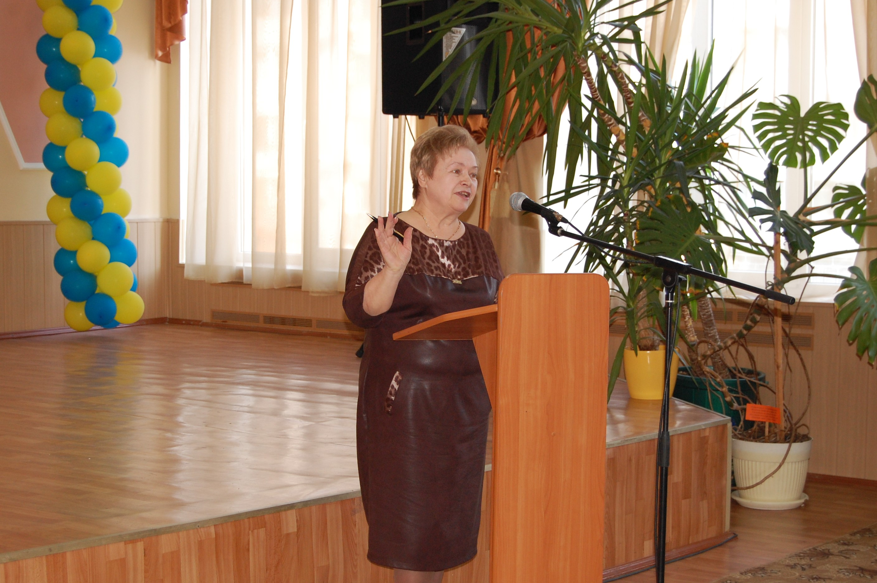 У роботі